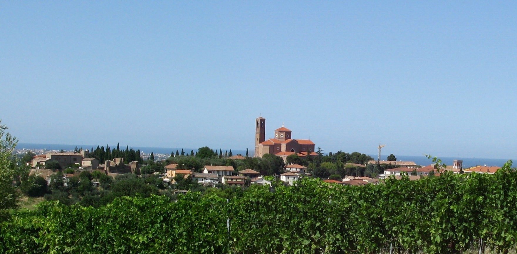 Panorama di Coriano.